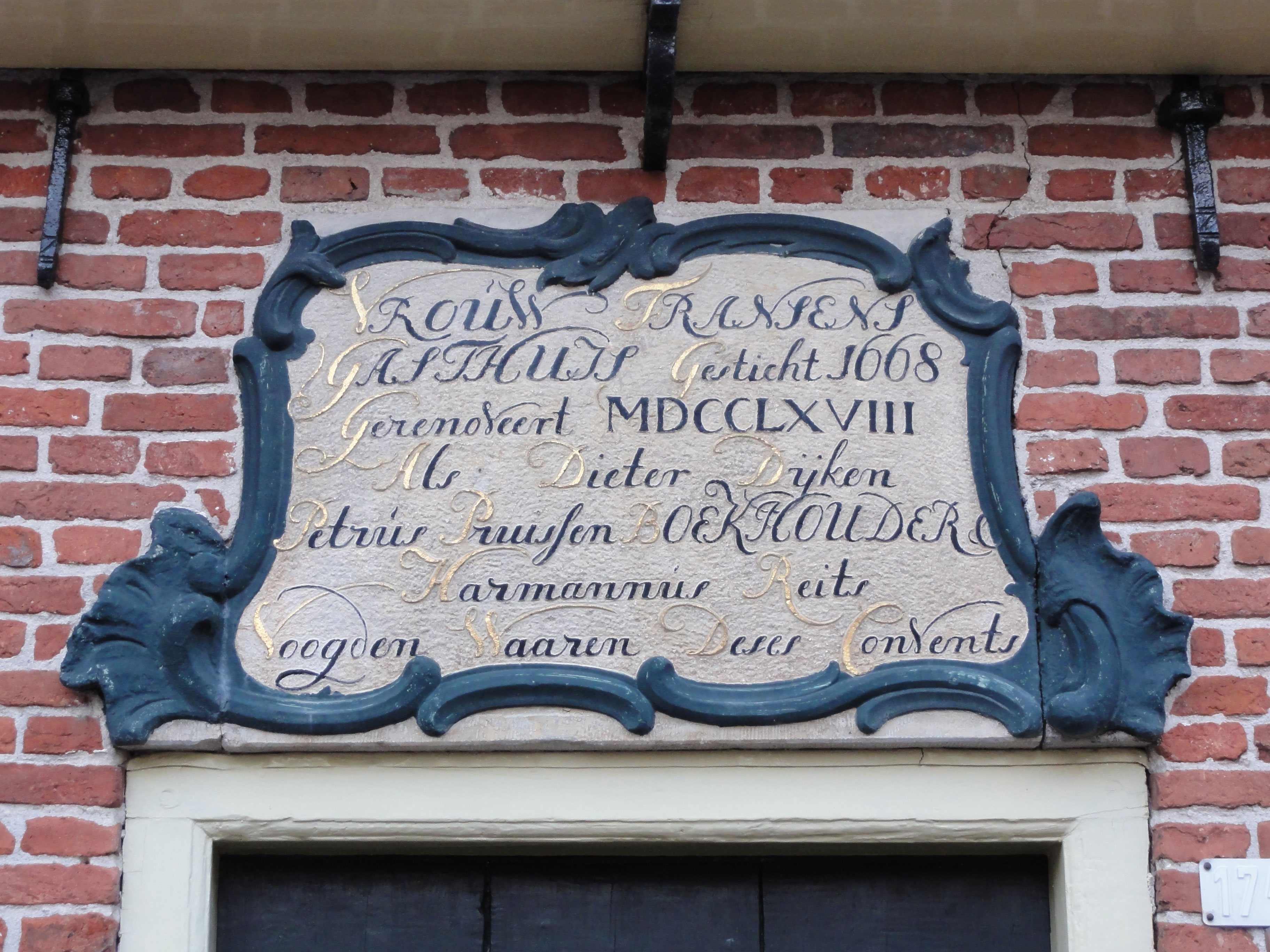 Steen "Vrouw Franssensgasthuis" of (Geertje Schiltgasthuis") Hoofdstraat 17a te Warffum